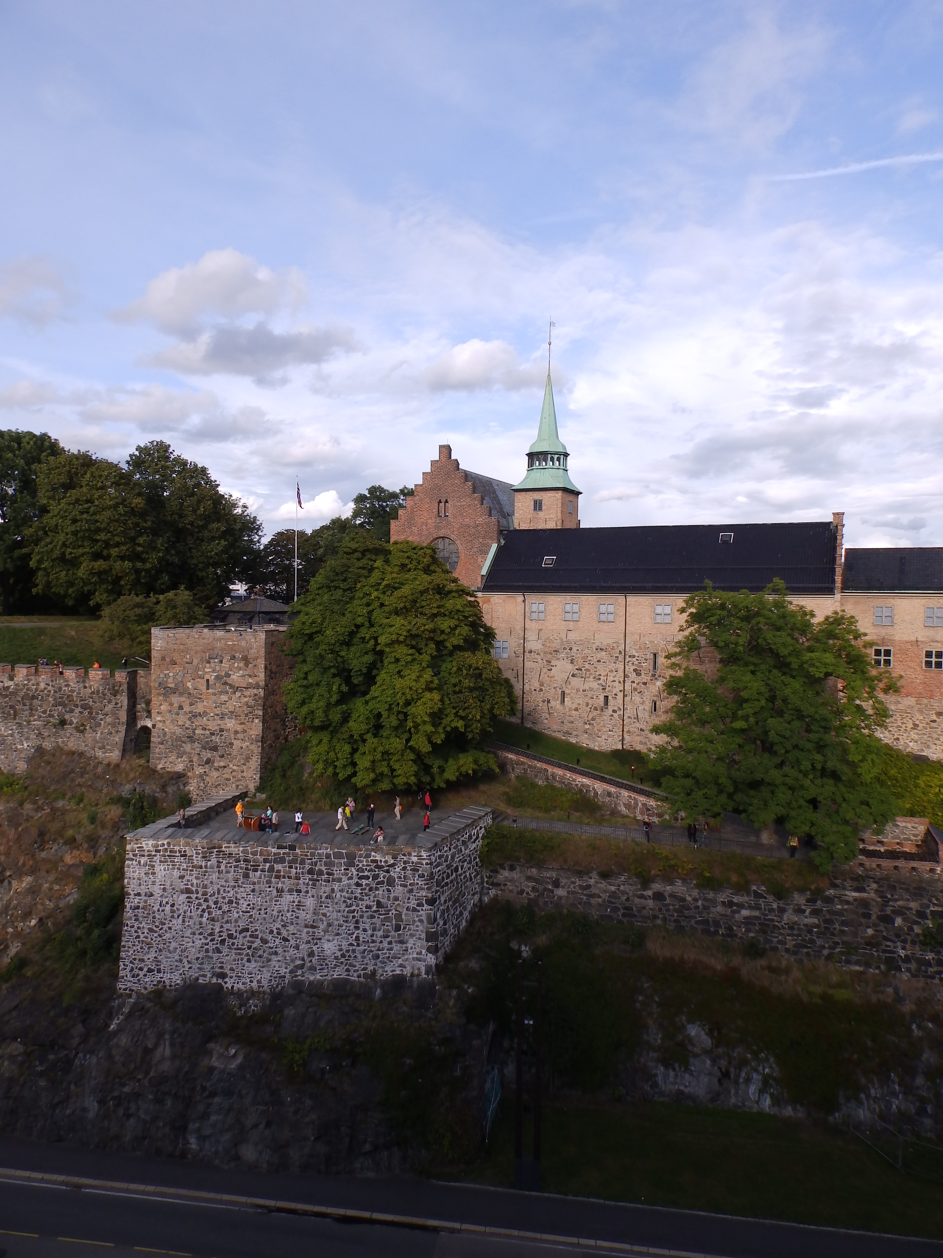 Die Festung Akerhus 2014